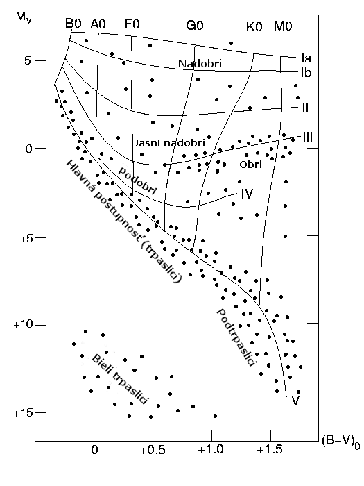 Opis: Diagram pre Hertzsprung-Russellov diagram Source: Vytvorené kým: Looxix, 2003 Upravené a preložené do slovenčiny: Bebe, 2005 Kategória:Astronomické obrázky Kategória:Obrázky schém Image:H-R diagram.png Slika:H-R_diagram_sl.png Bild:250px-H-R diagram.png